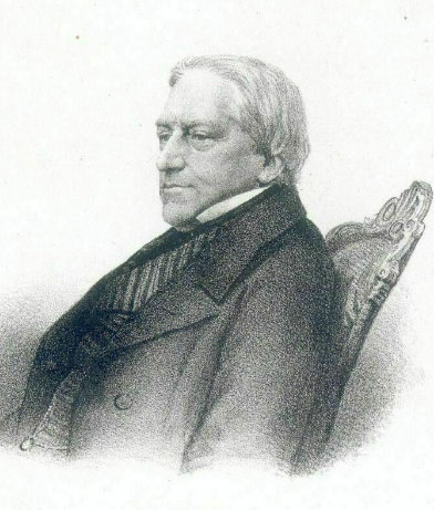 Anthony Gerhard Alexander van Rappard (1799-1869)